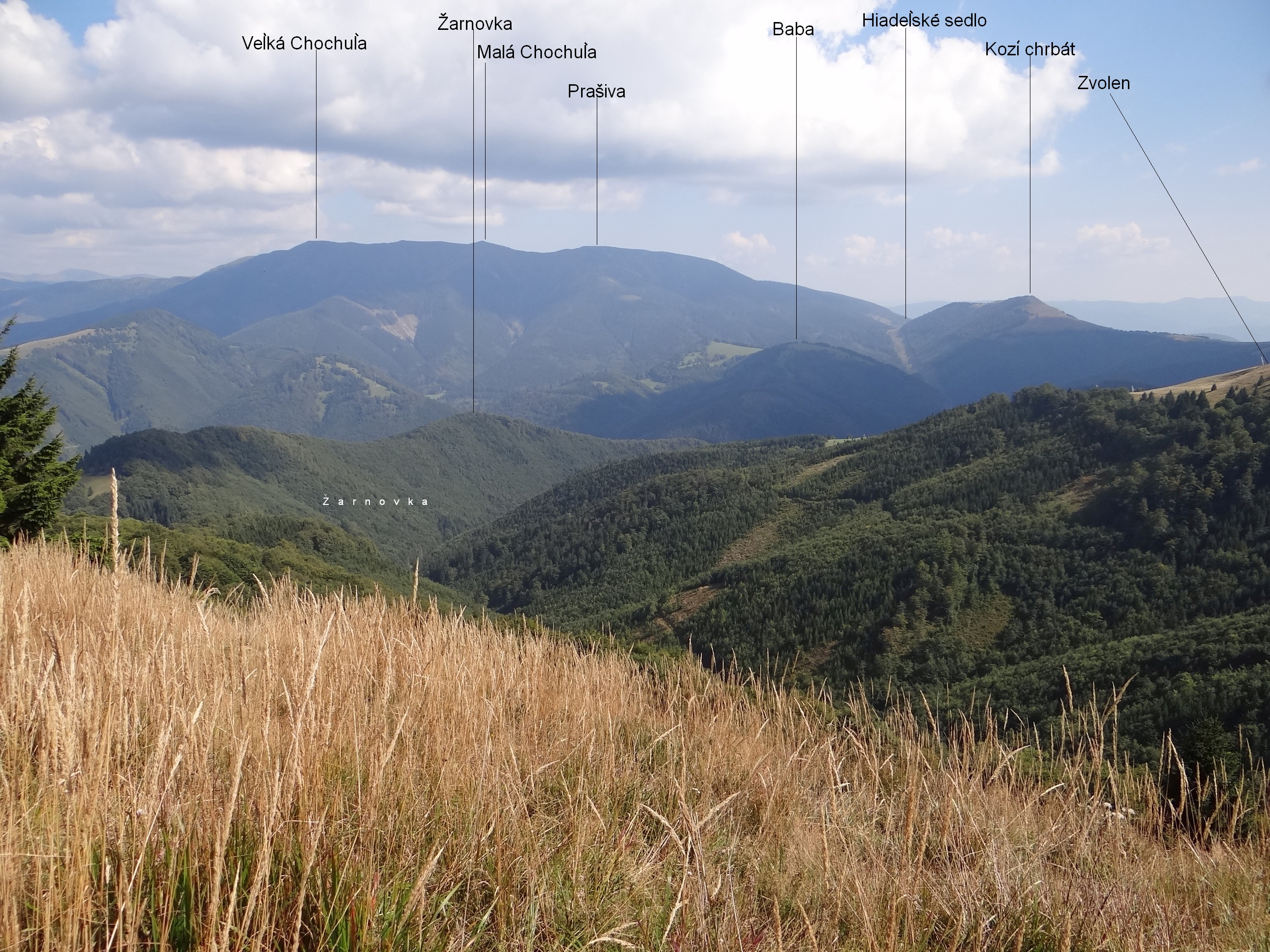 Žarnovka. Veľká Fatra